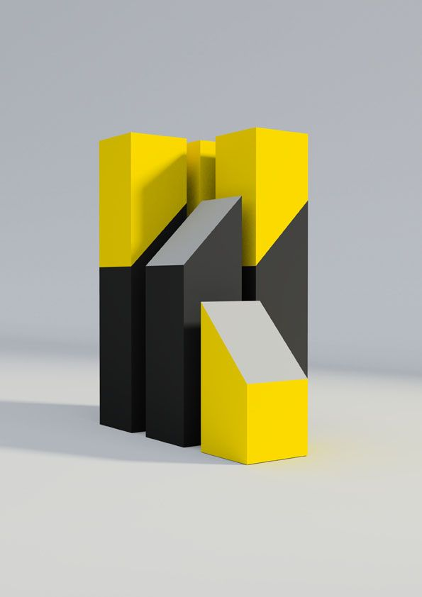 Estructura I